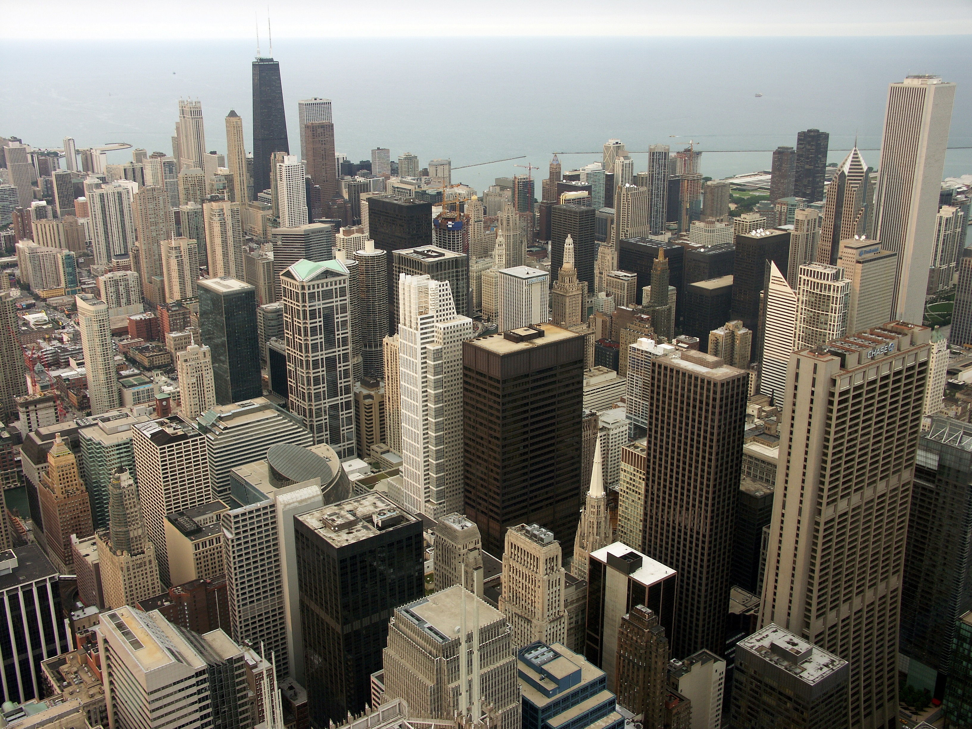 Chicago, Blick aus der 103. Etage des SEARS-Towers